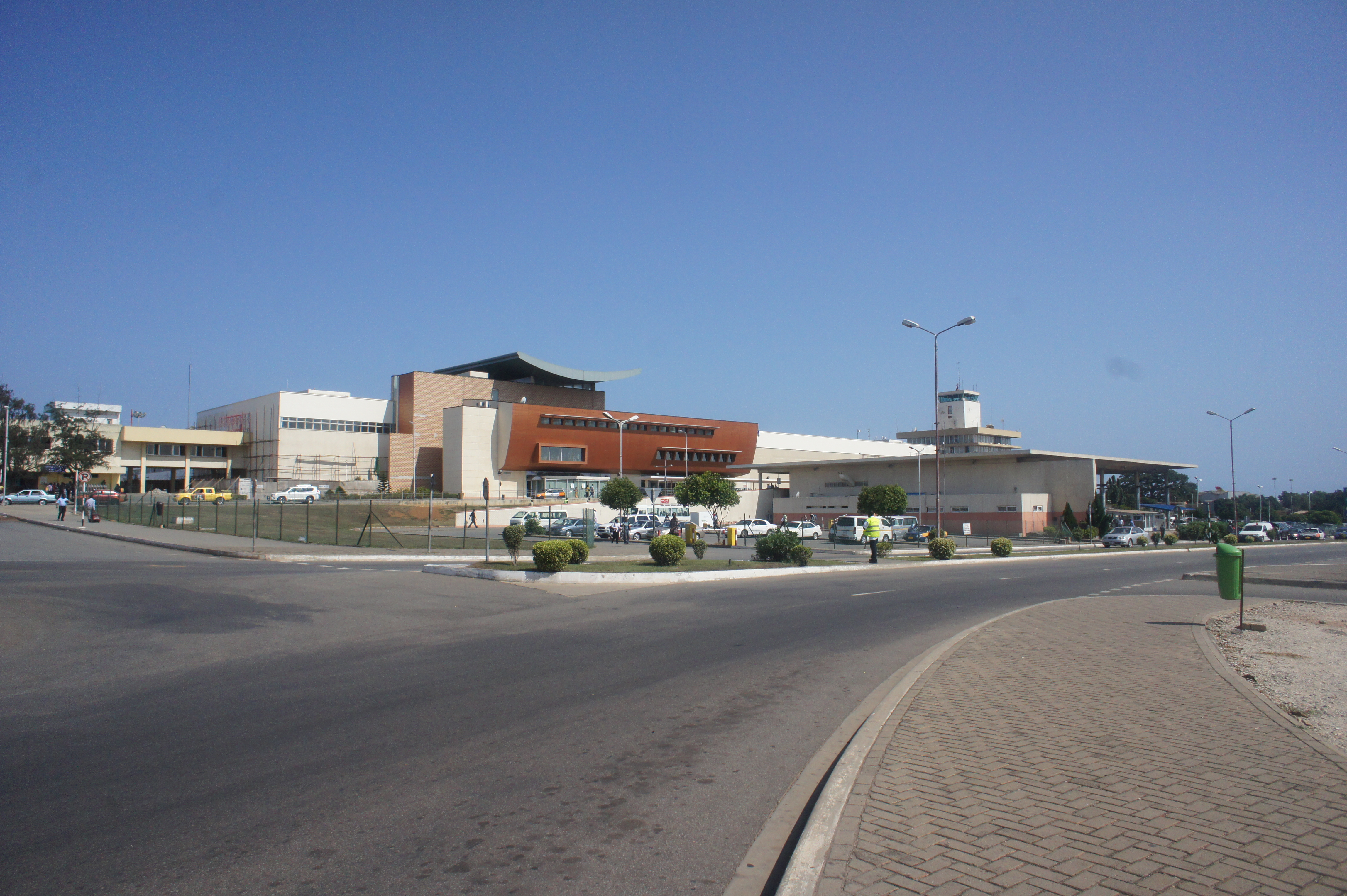 コトカ国際空港